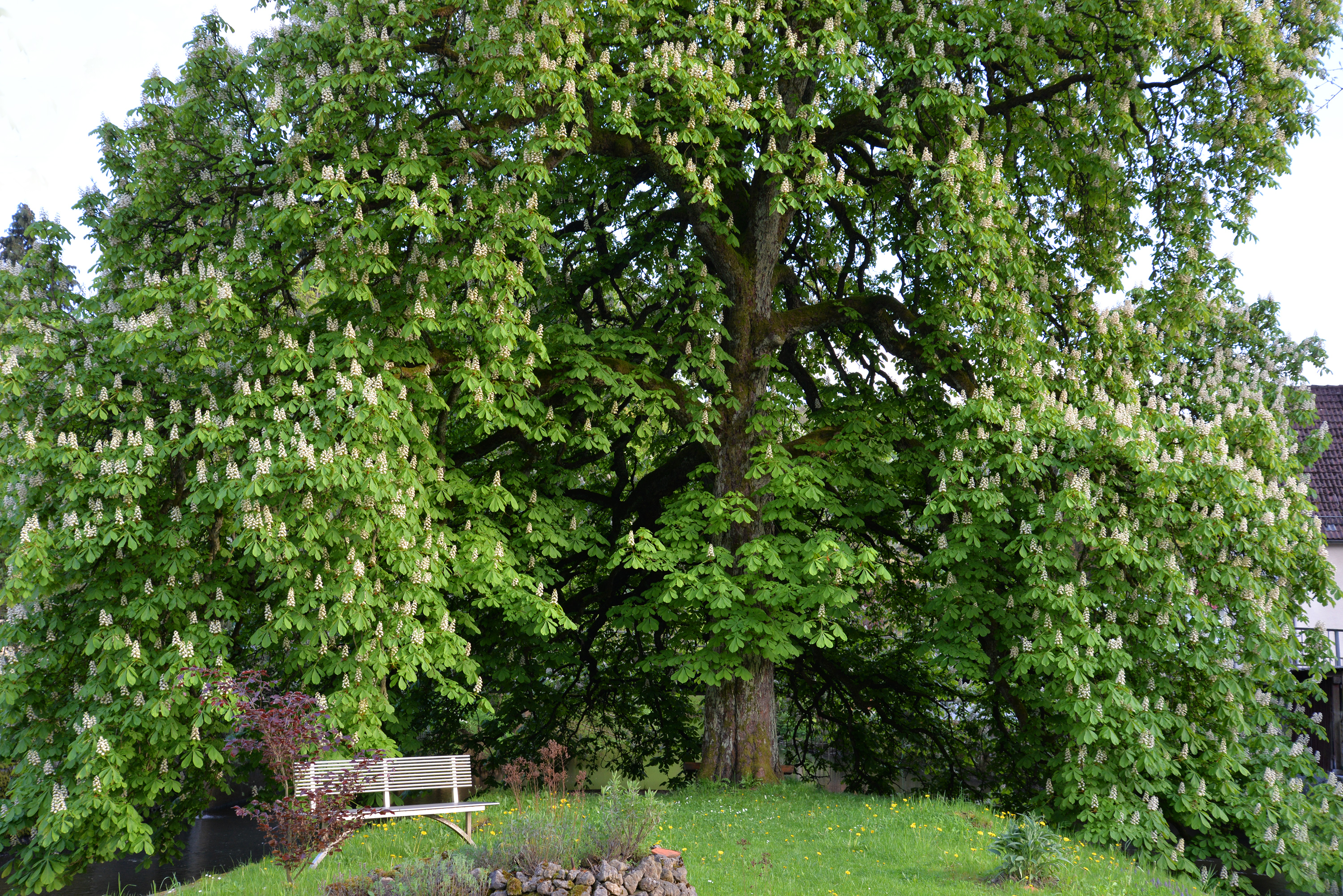 Die Kastanie auf der Pegnitzinsel in Vorra.